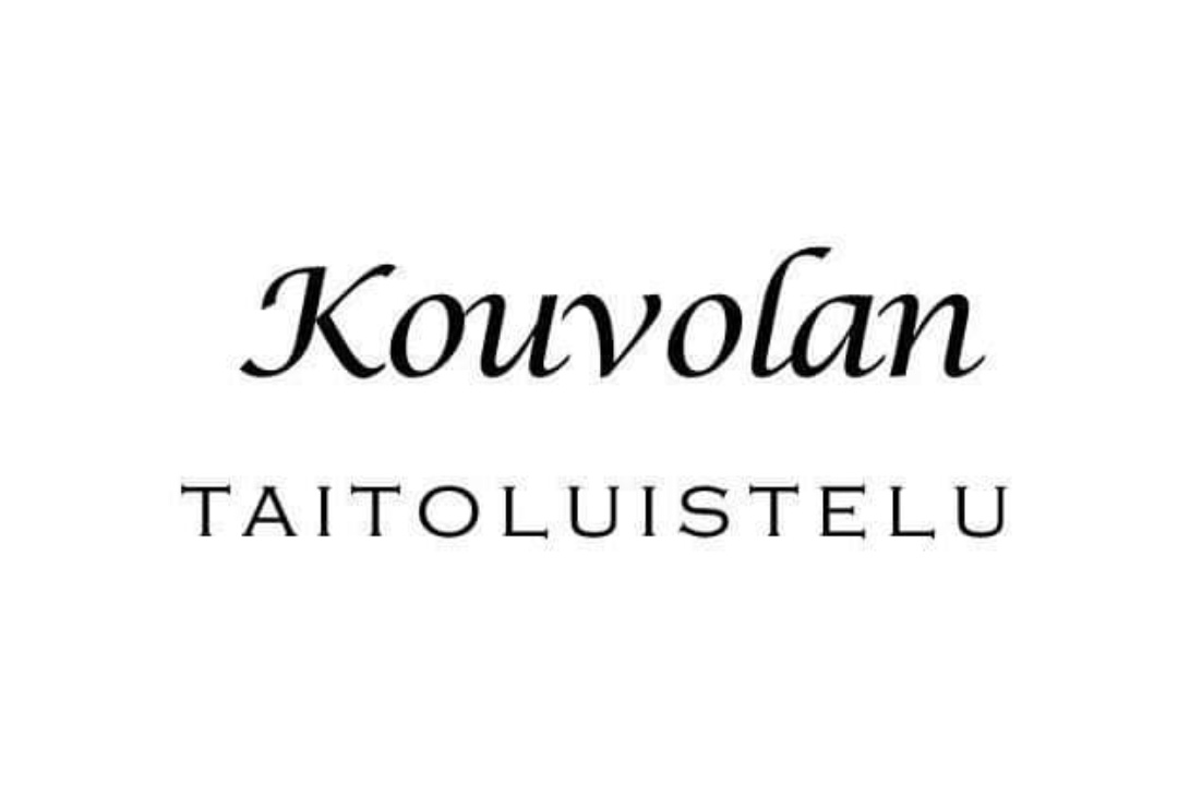 Kouvolan taitoluistelun (KTL) logo